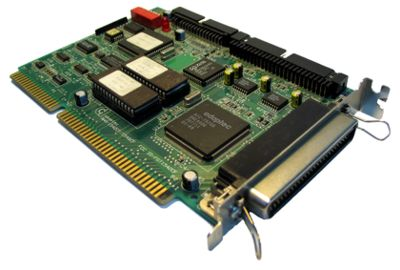 kontroler scsi na szynę isa foto - rjt: wszelkie prawa uwolnione: all rights is free